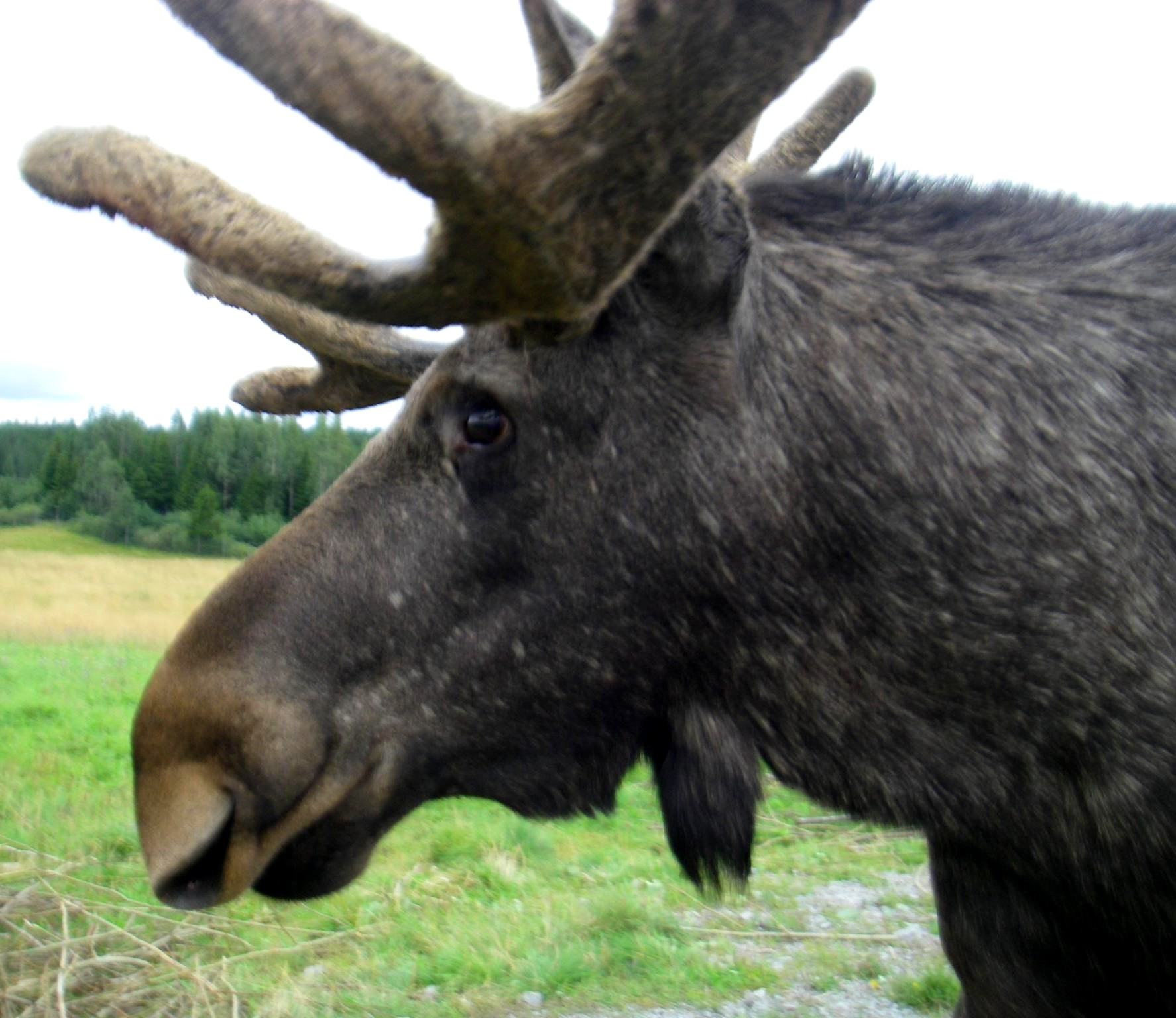 Älgbild från Älgens Hus i Balsjö, Bjurholms kommun, 2013